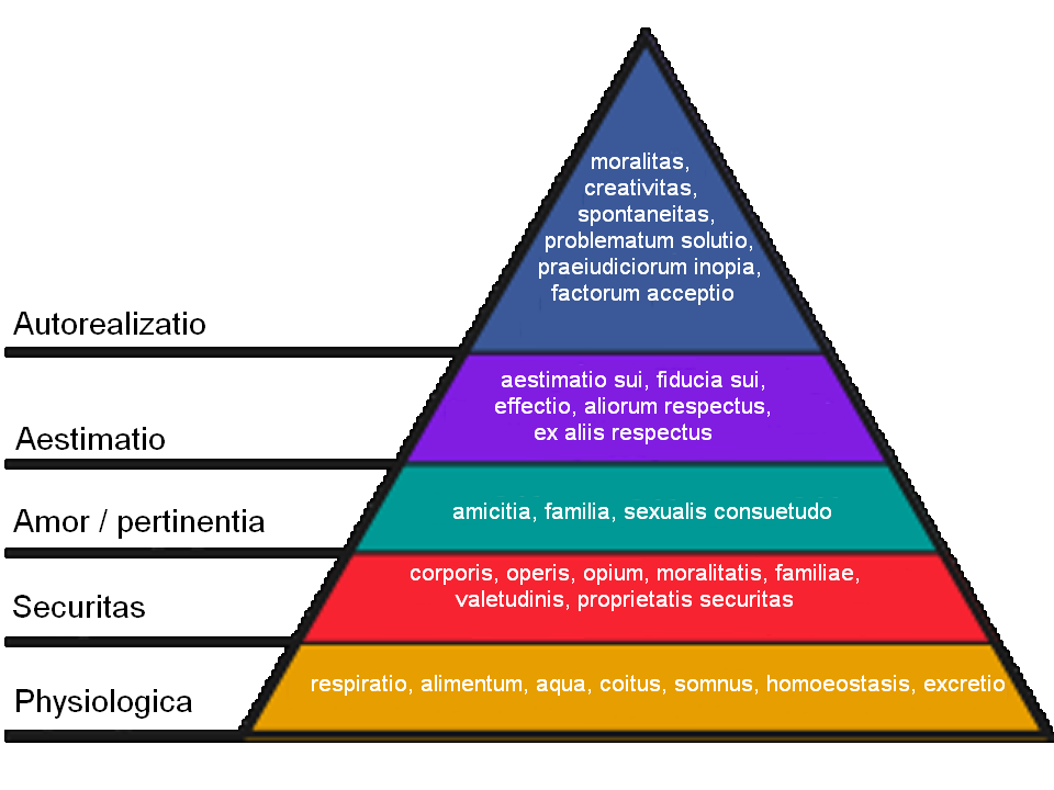 Hierarchia necessitatum Abrahami Maslow